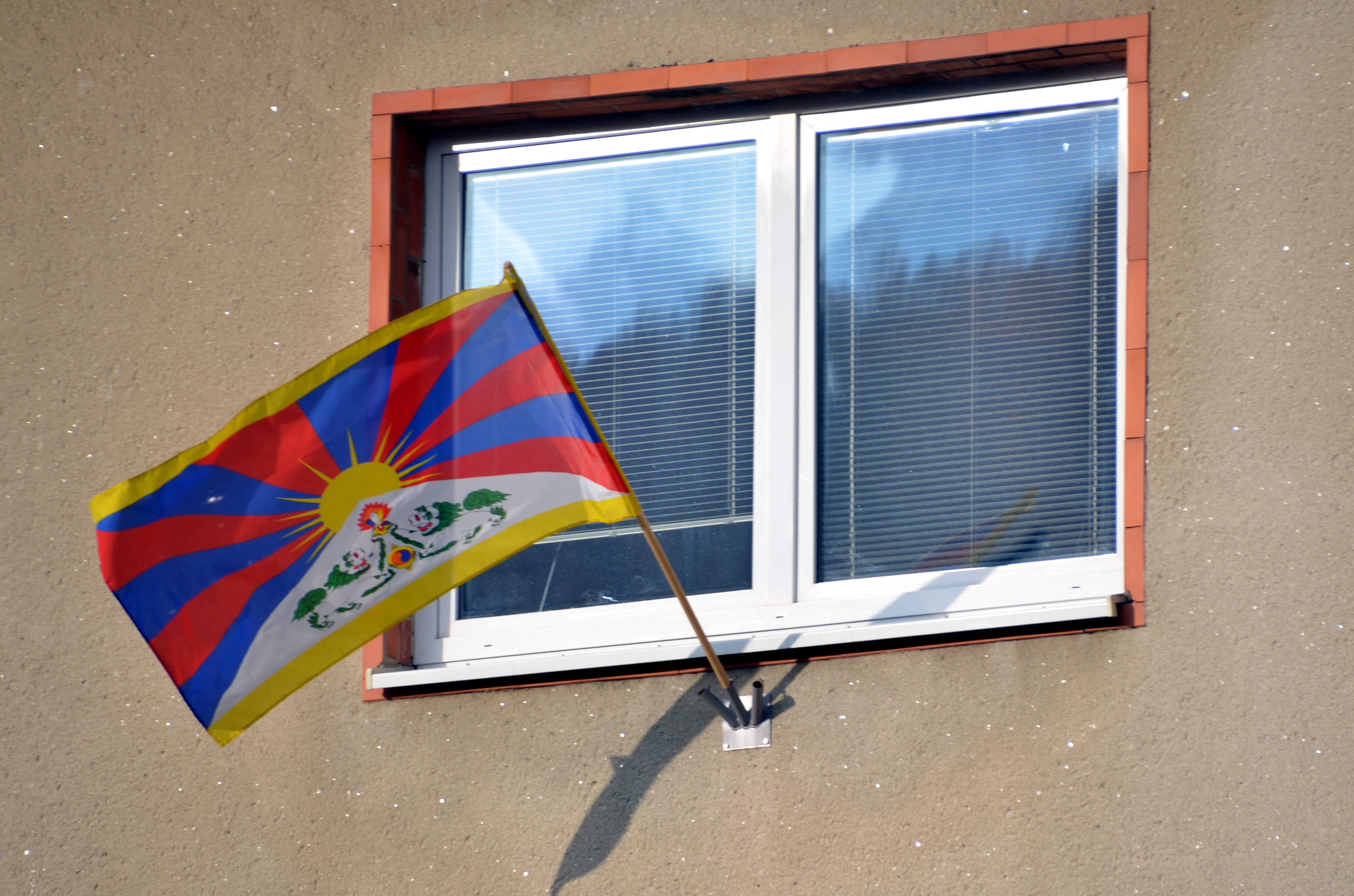 Tibetská vlajka na budově městského úřadu v Adamově při kampani Vlajka pro Tibet